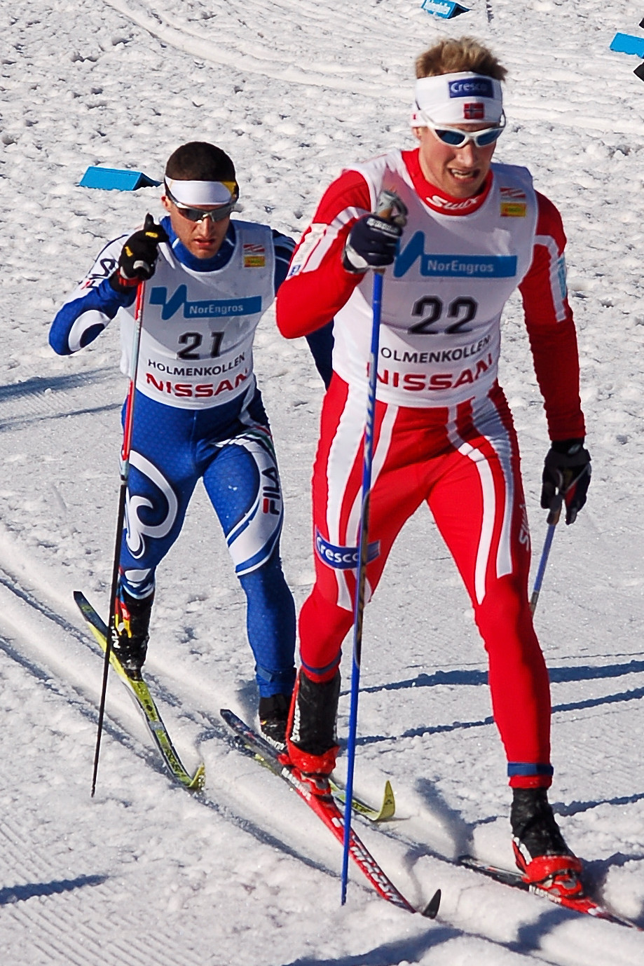 Oslo, Norway 2007 (21 Fulvio Scola, 22 Krister Trondsen)